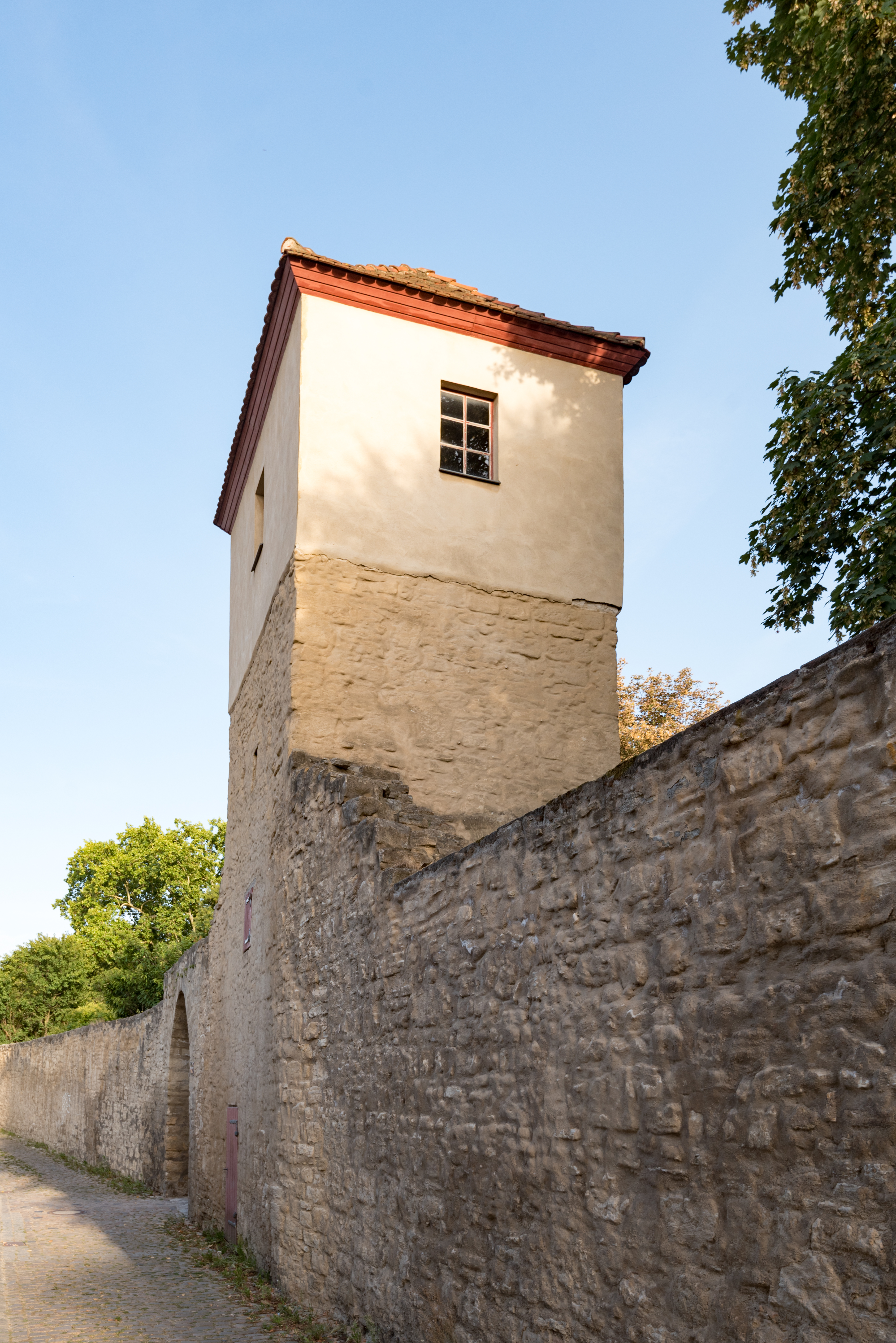 Naumburg (Saale), Wenzelsmauer, Stadtmauer